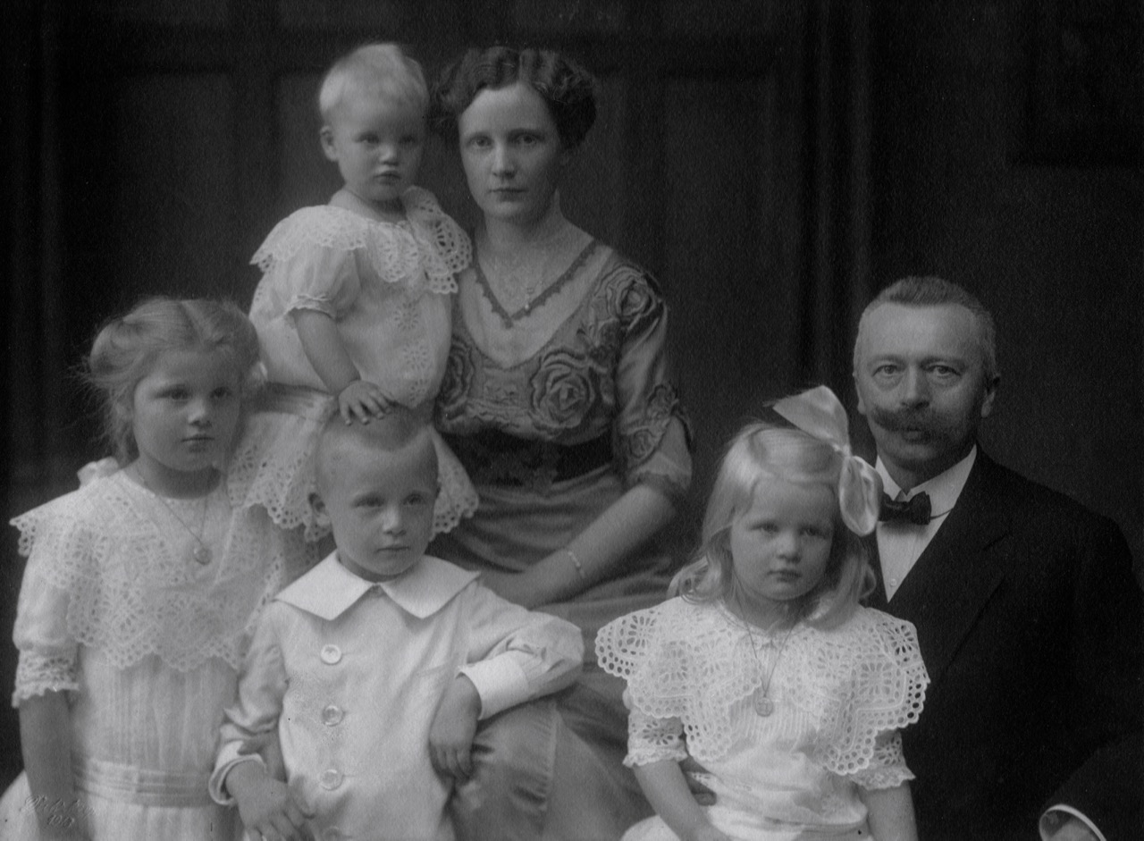 Gut Wittenborgh, Carl Arend Ficke und Familie (Driftsethe Niedersachsen)